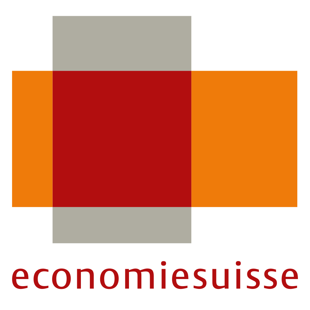 Logo von Economie Suisse